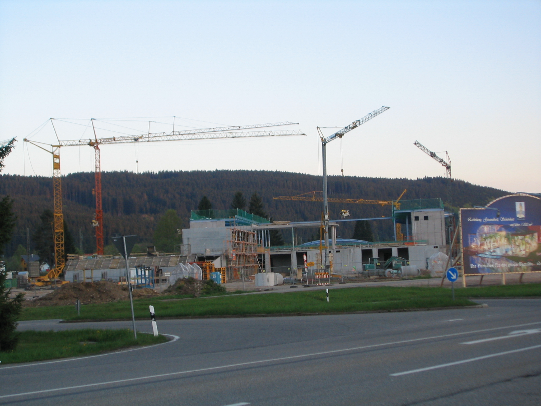 Die Baustelle zum Badeparadies am Titisee